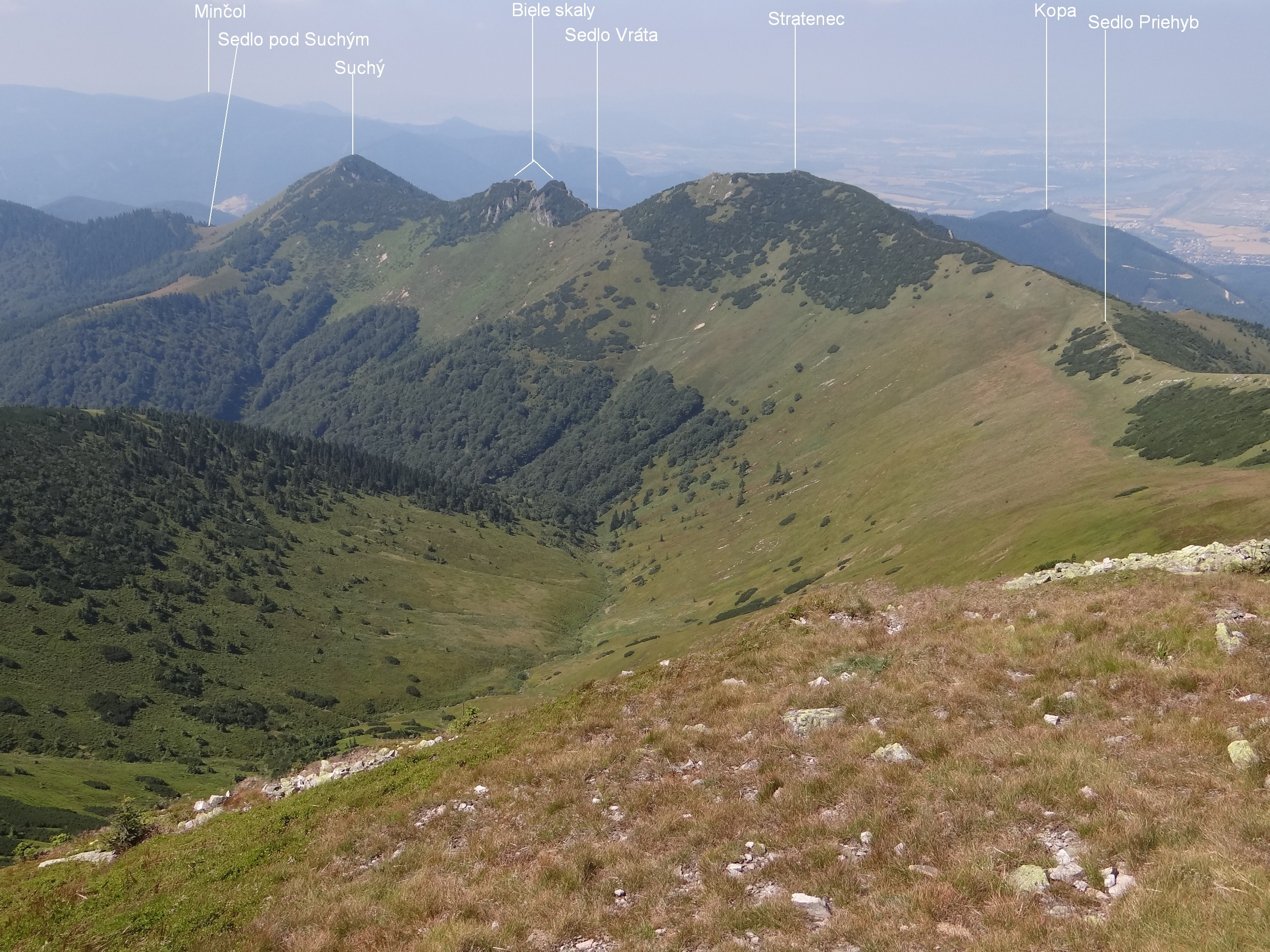 View from Malý Kriváň